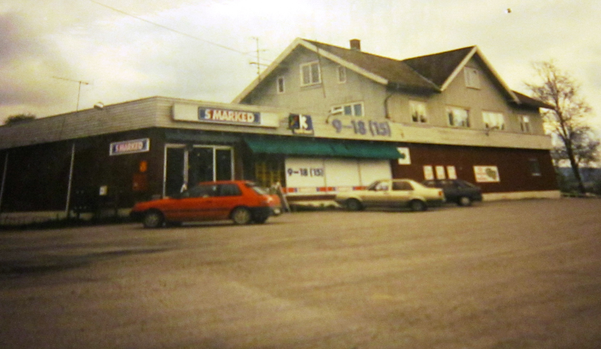 Lierfoss samvirkelag før nedleggelsen i 2001.